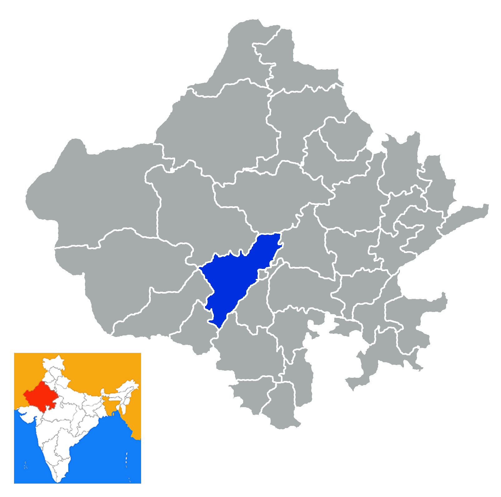 Distrito de Pali Rajastan India